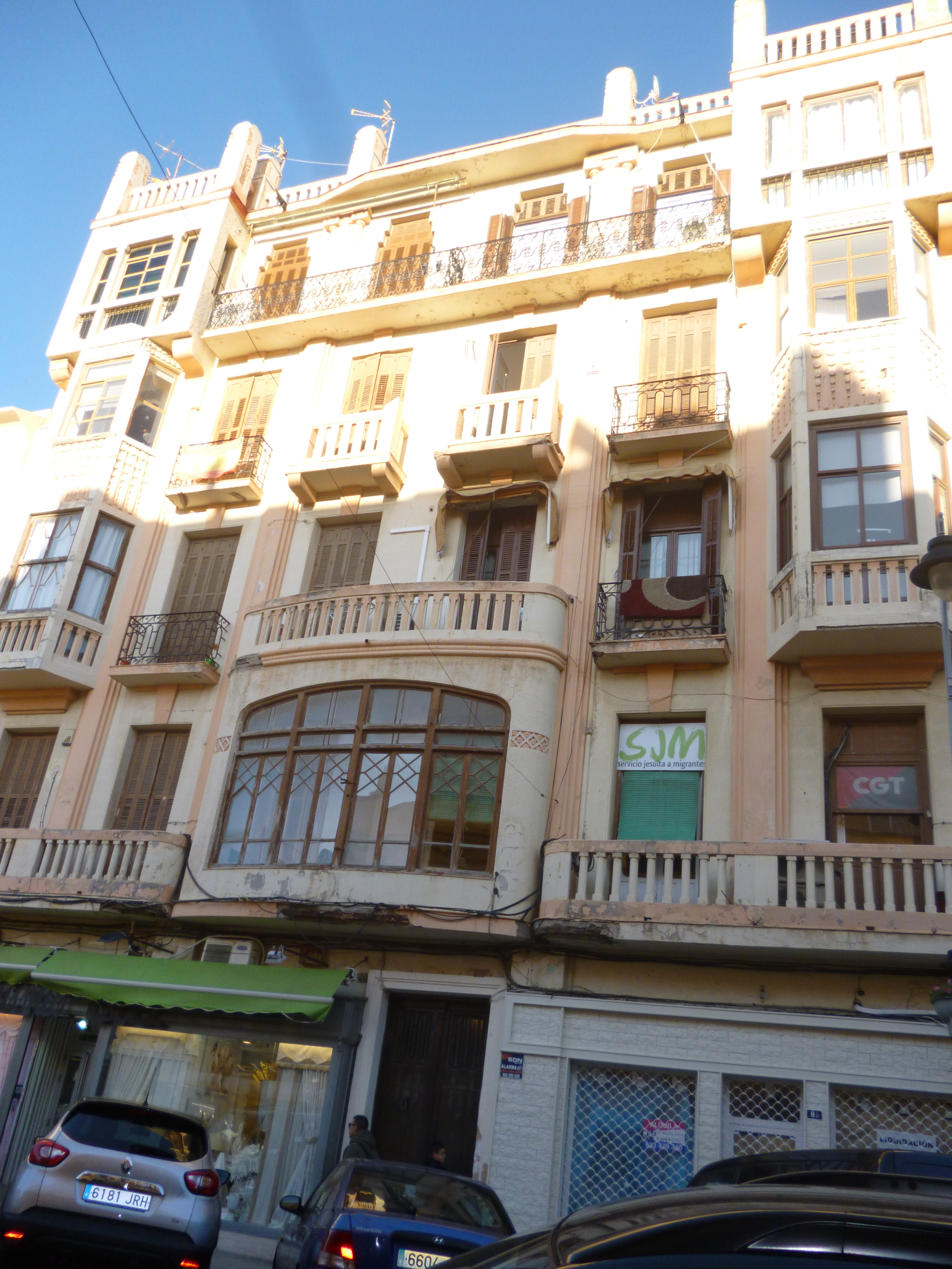 Casa de Josefa Botella Segarra